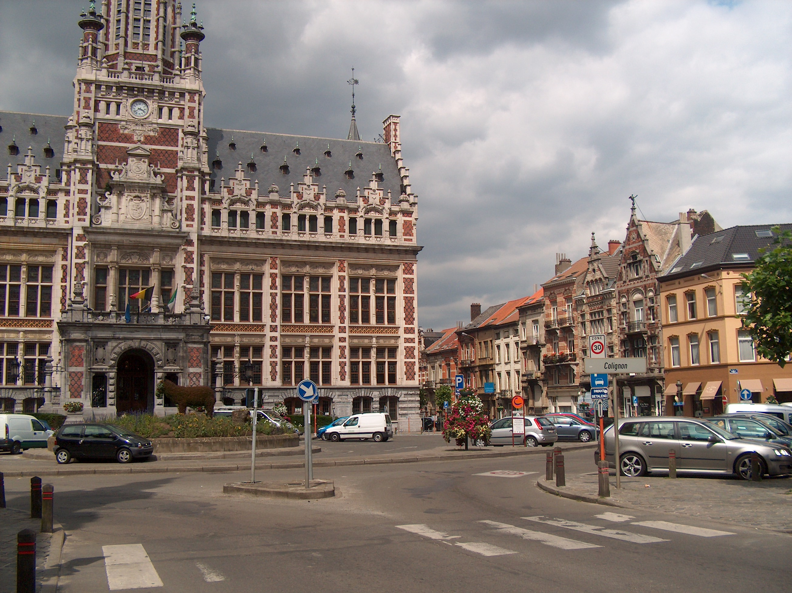 La place Colignon à Schaerbeek, Bruxelles, Belgique.